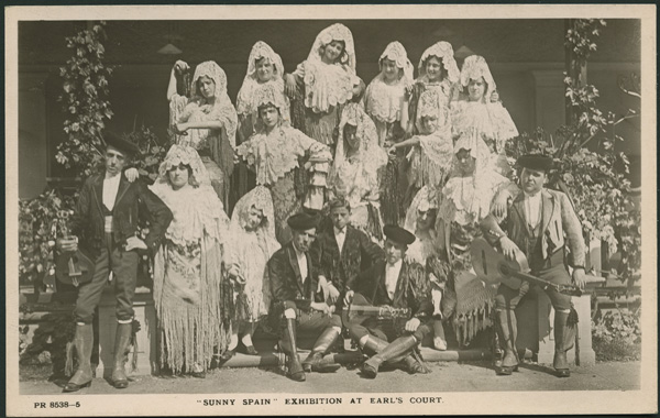 Tarjeta postal. Exposición londinense de Earl´s Court con personajes de vestimenta española.